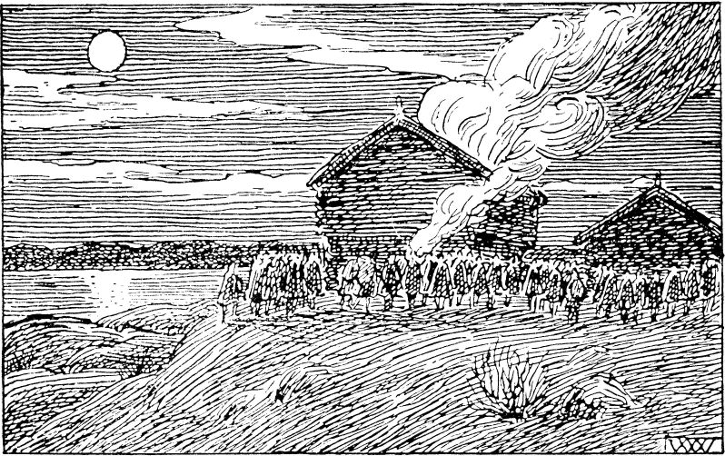 Wilhelm Wetlesen: Illustration for Magnus Erlingssons saga, Heimskringla 1899-edition. nn: «Erling kringsette huset til Ossur og brende han inne.»